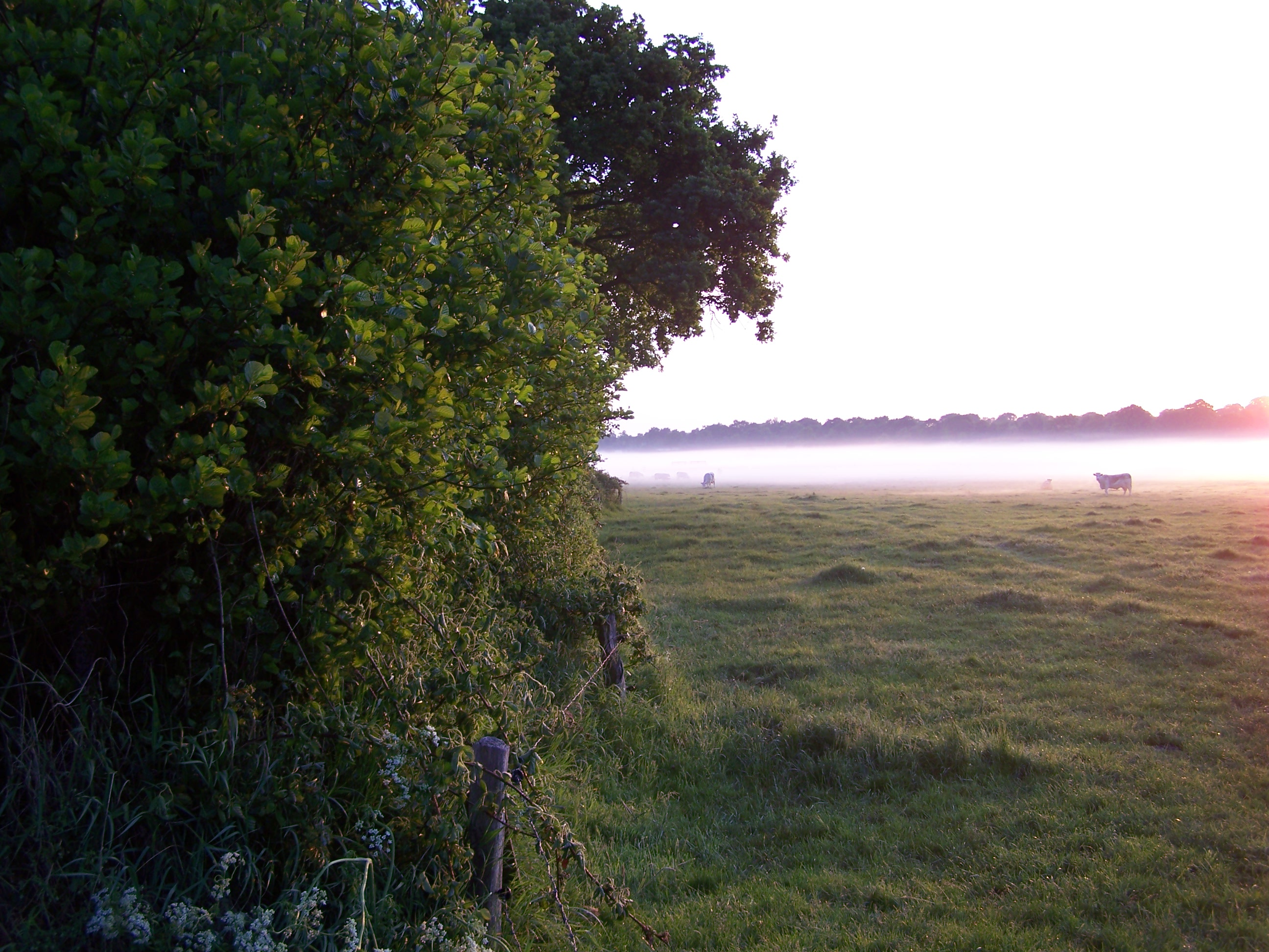 Morgendliches Erwachen in der Flusslandschaft Eider-Treene-Sorge